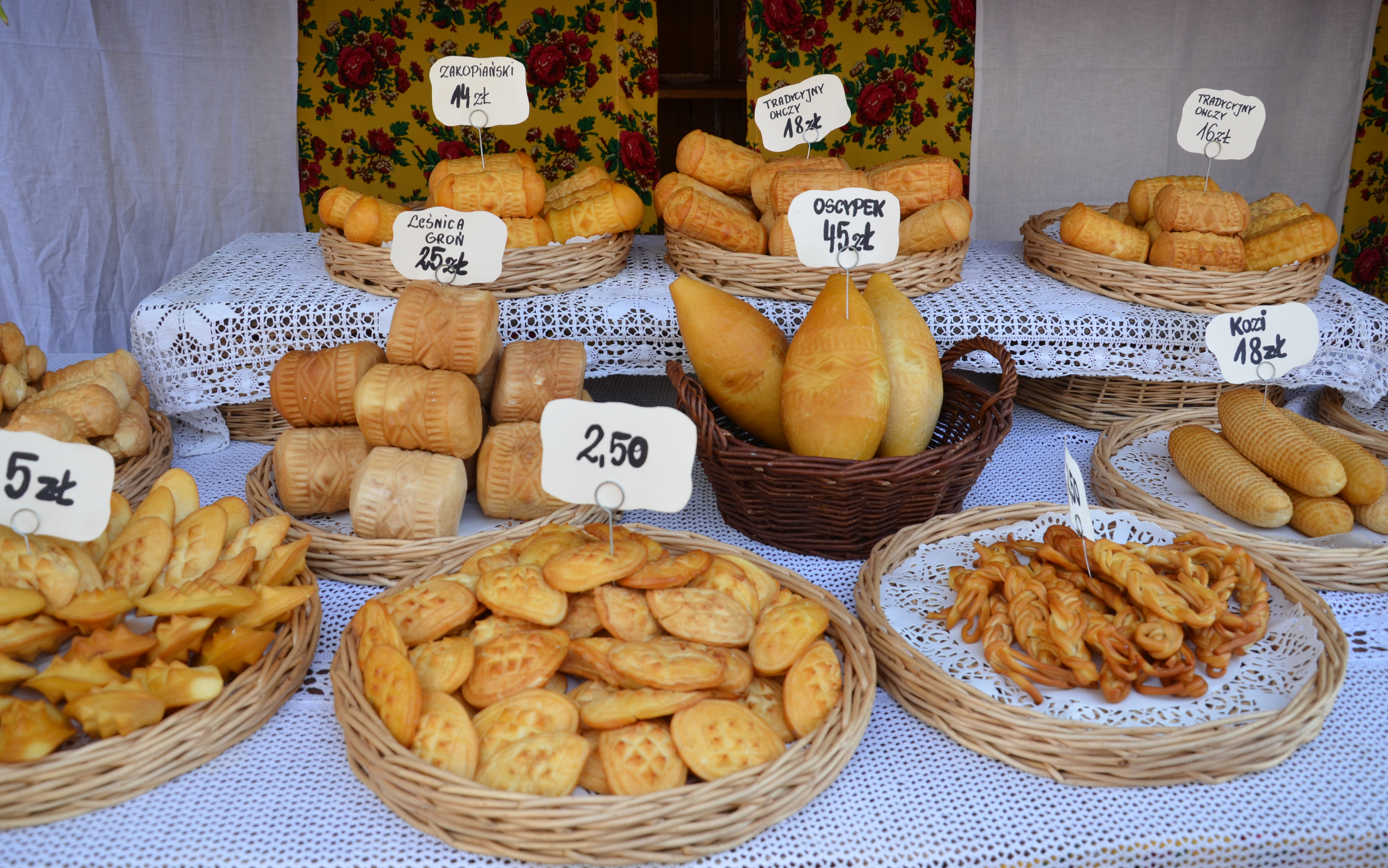 Beskidischer Schnittkäse